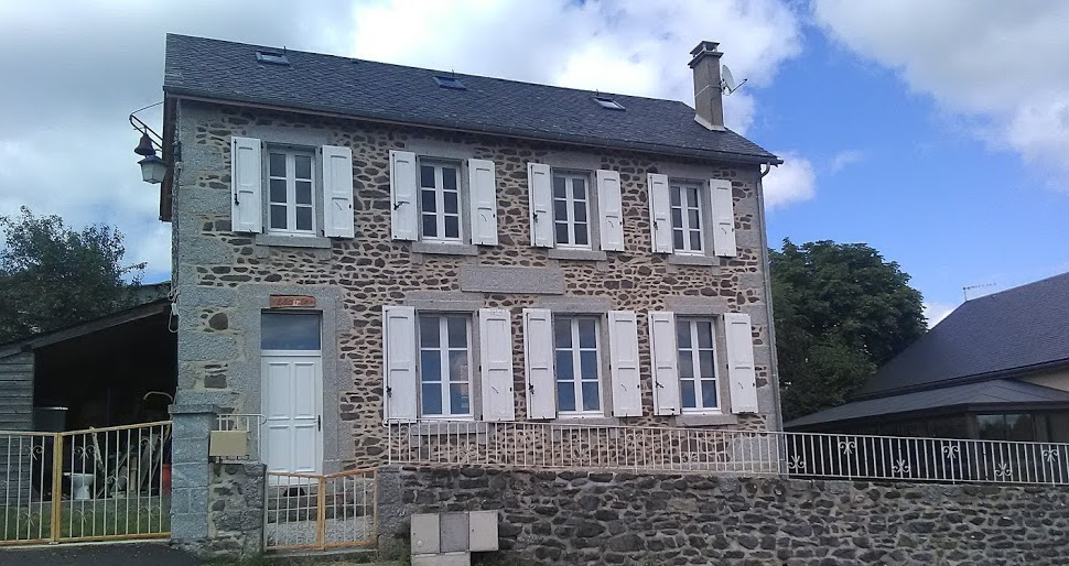 Mairie, ancienne école publique de Julianges (Lozère).